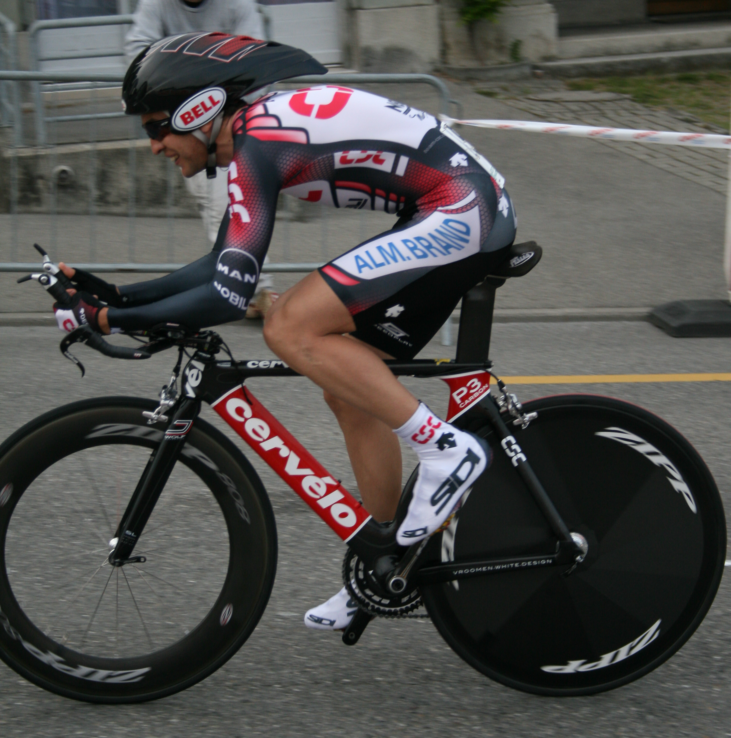 Carlos Sastre prologue du Tour de Romandie 2007 (Sastre finit le Tour en 25e place.)